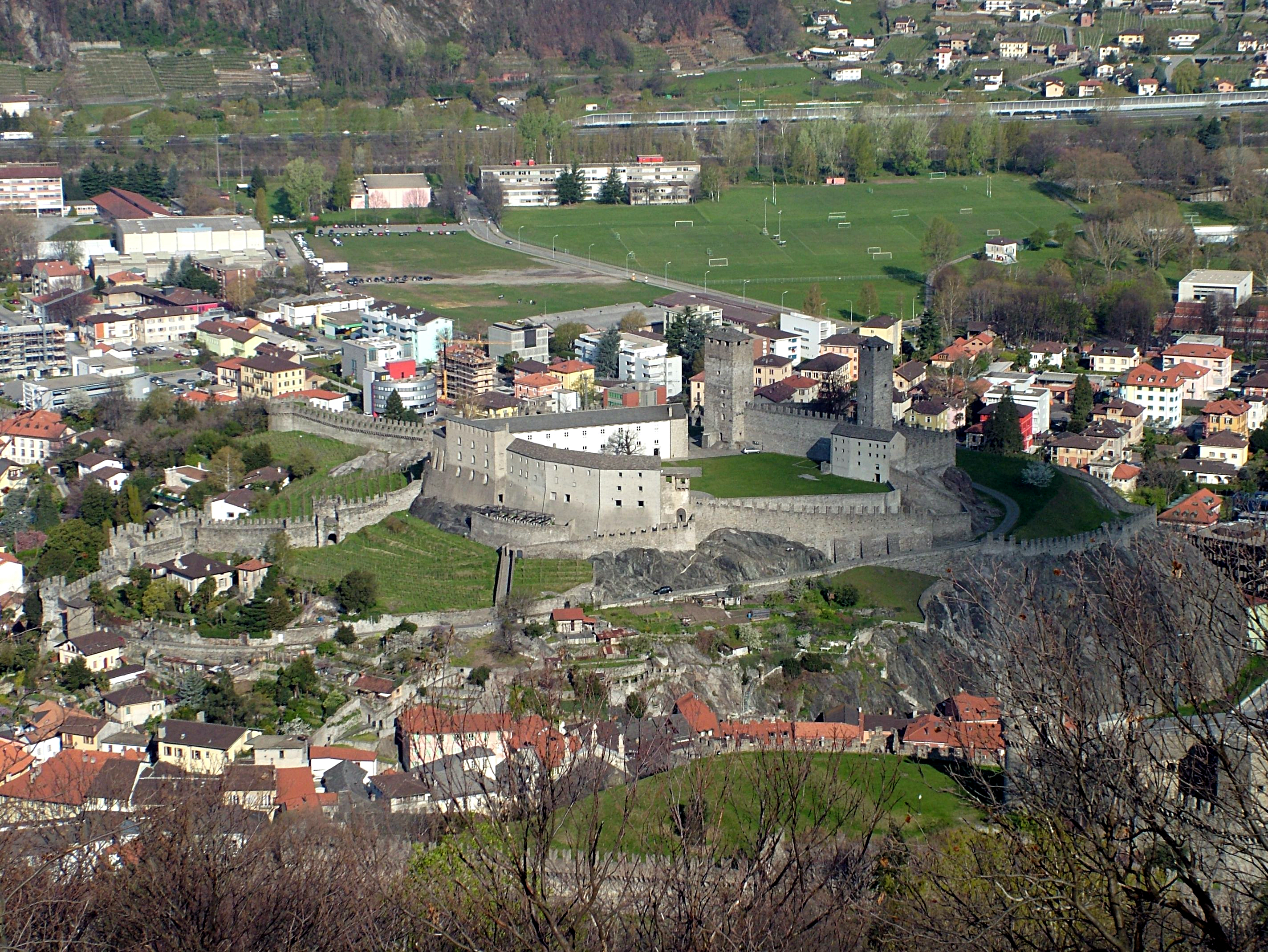 Bellinzona, Castelgrande vom Castelo die Sasso aus